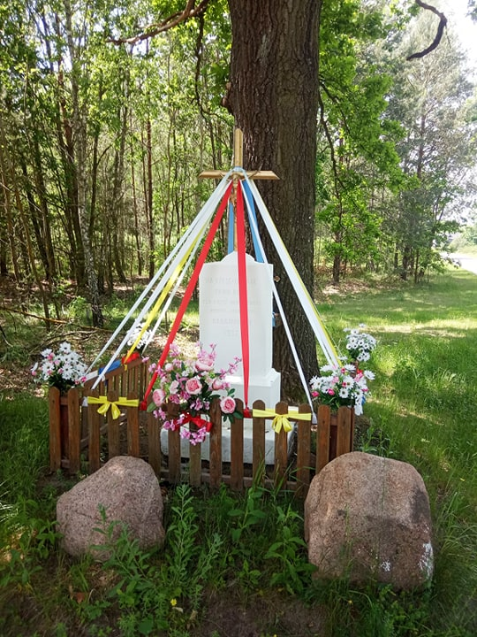 Leszczyny, figura z krzyżem z 1932 r.